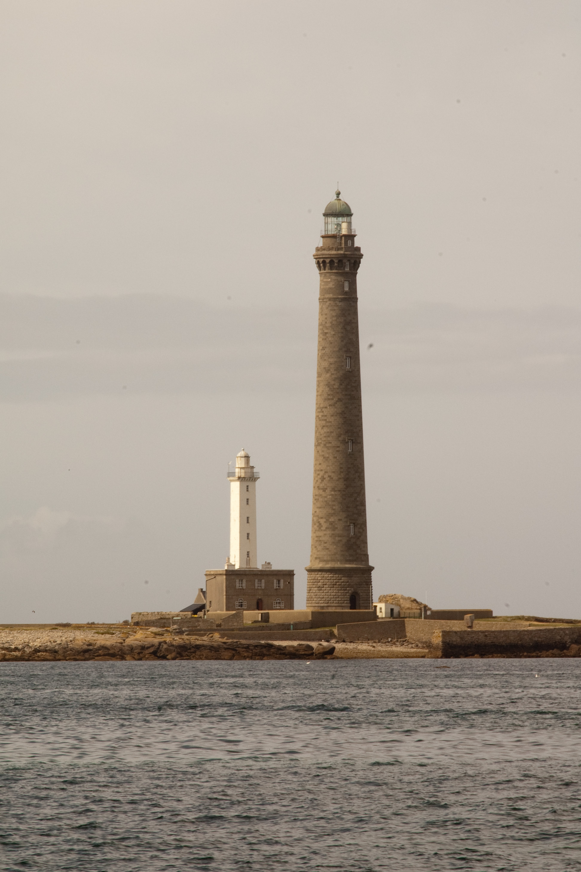 Phare de l'ïle vierge dans le Finistère